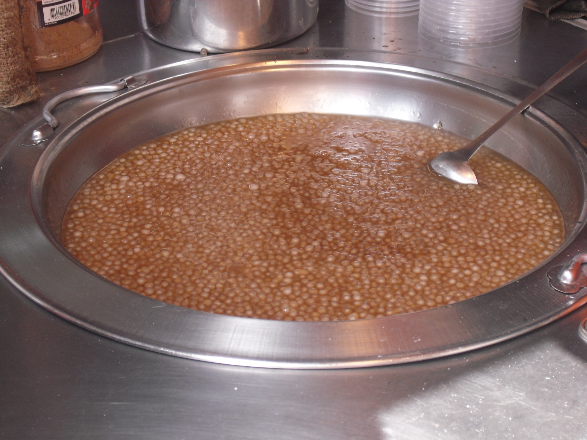 Bân-lâm-gú: 粉圓，佇金包里老街遐翕的，擔仔叫古早味懷念粉圓，查某顧擔，查埔佇邊仔現做粉圓，共一滴一滴的水幌落樹薯粉，沓沓仔挲做粉圓。